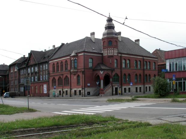 Ratusz w Lipinach